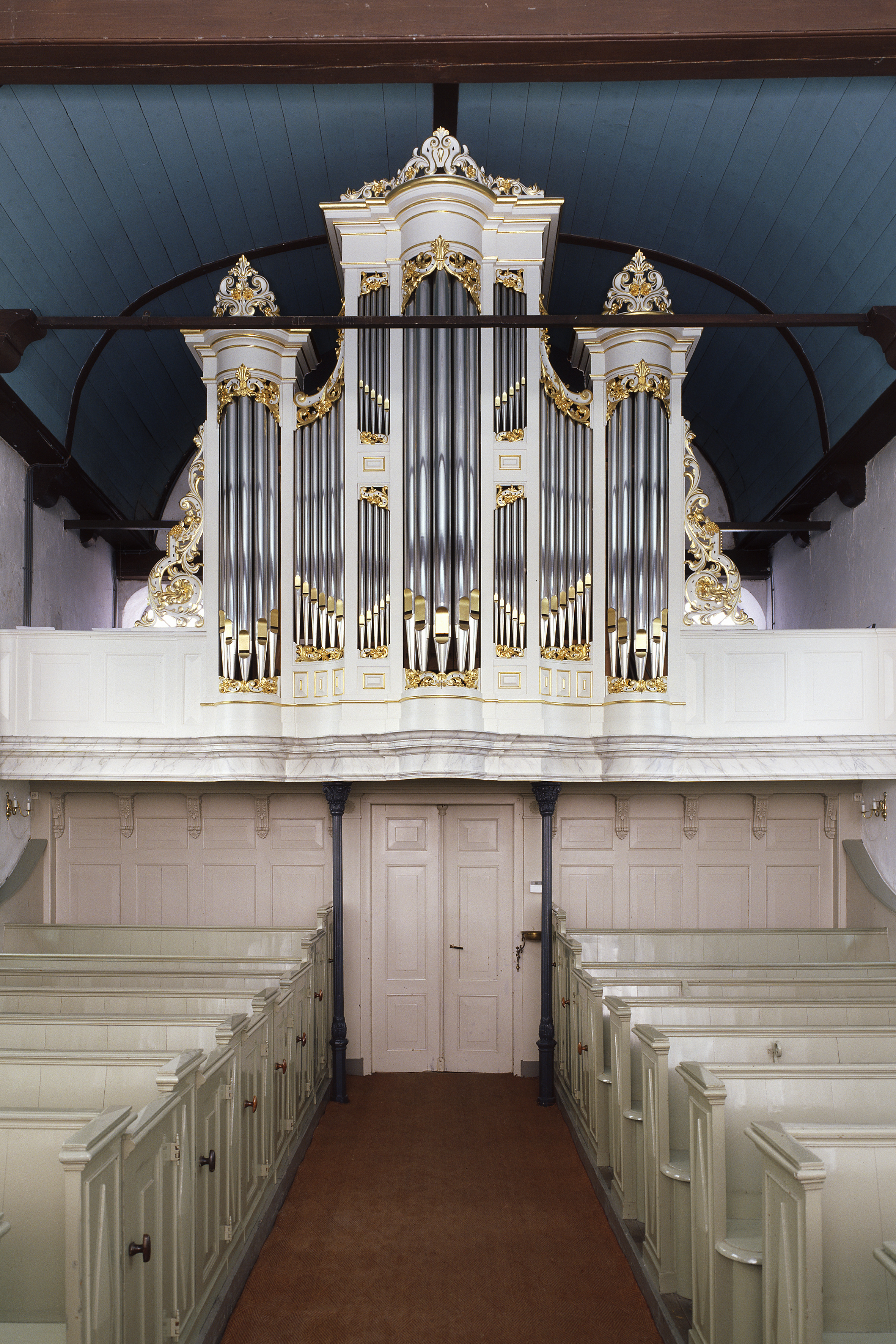 Nederlands Hervormde Kerk: Intenieur, aanzicht orgel, orgelnummer 1616 (opmerking: Gefotografeerd voor Het Historische Orgel in Nederland 1872-1878, bladzijde 174)